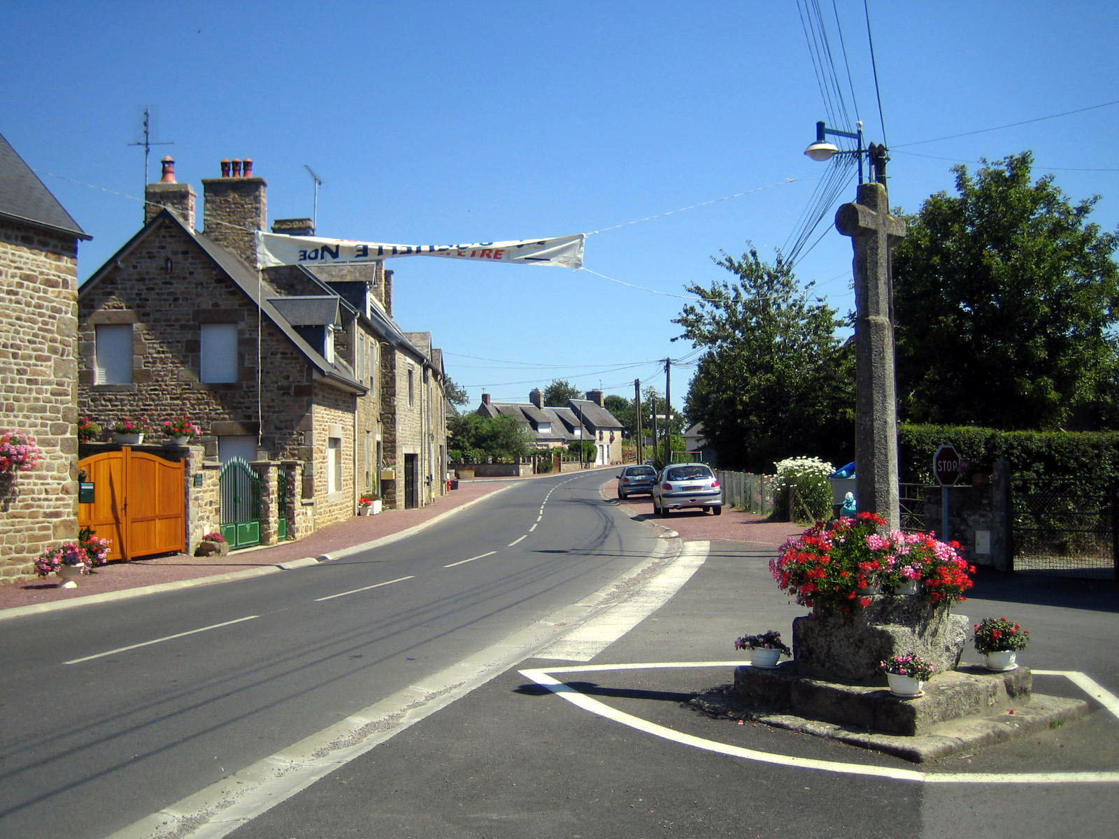 Le carrefour de la Croix à La Rochelle-Normande.